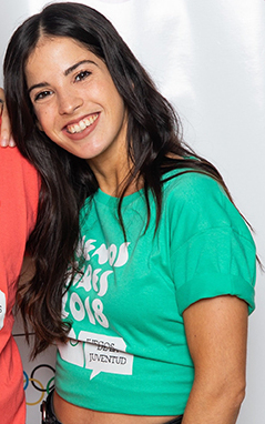 Candelaria Molfese y Fernando Dente en la presentación de “Vamos juntos”, la canción oficial de los Juegos Olímpicos de la Juventud llevado a cabo en Buenos Aires en 2018.